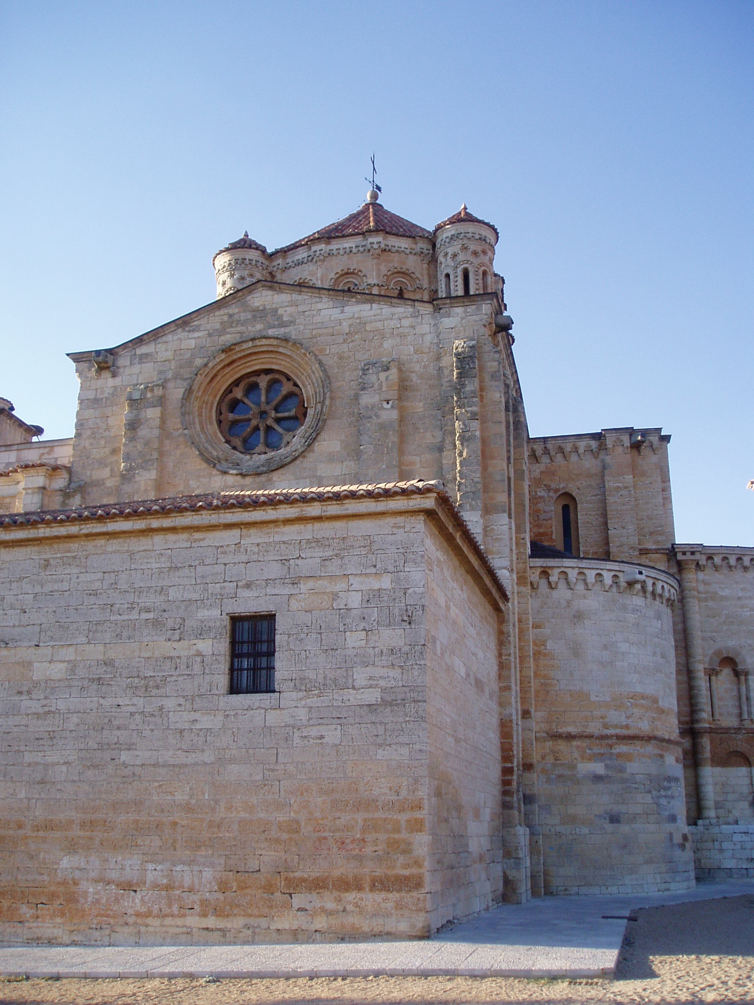 Colegiata de Santa María la Mayor, en Toro (Zamora)